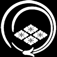 「松鸚會」紋（染抜）